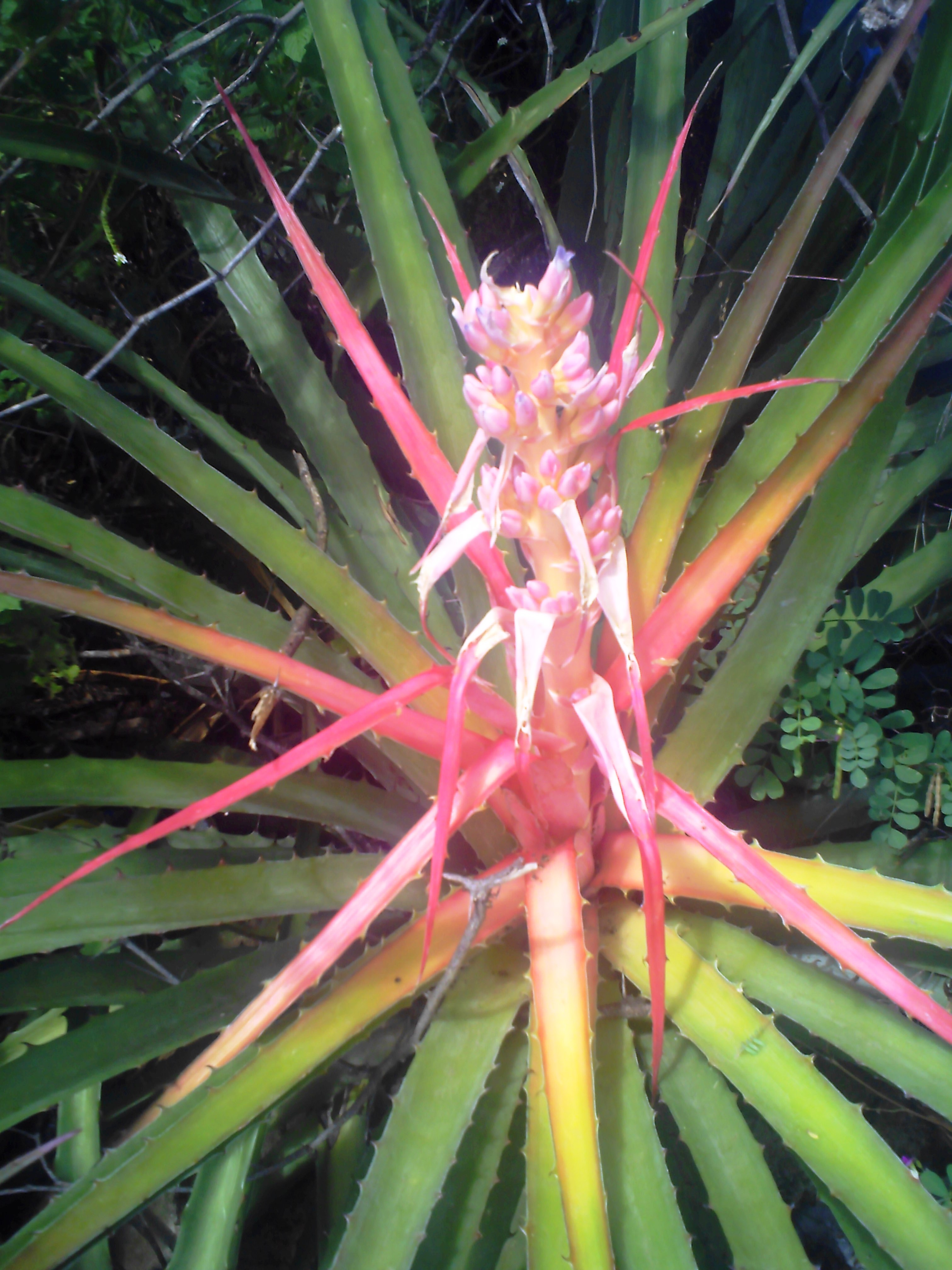 Florescência da Bromelia lacioniosa, populamente conhecida como macambira.